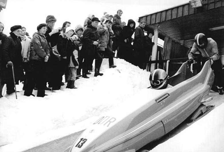 Bernhard Lehmann, Bogdan Musiol ADN-ZB Schaar 7.3.84 Suhl: DDR-Meisterschaften im Zweierbob-Die olympischen Silbermedaillengewinner Bernhard Lehmann - Begdan Musiol wurden auf der Oberhofer Kunsteisbahn DDR-Meister 1984.